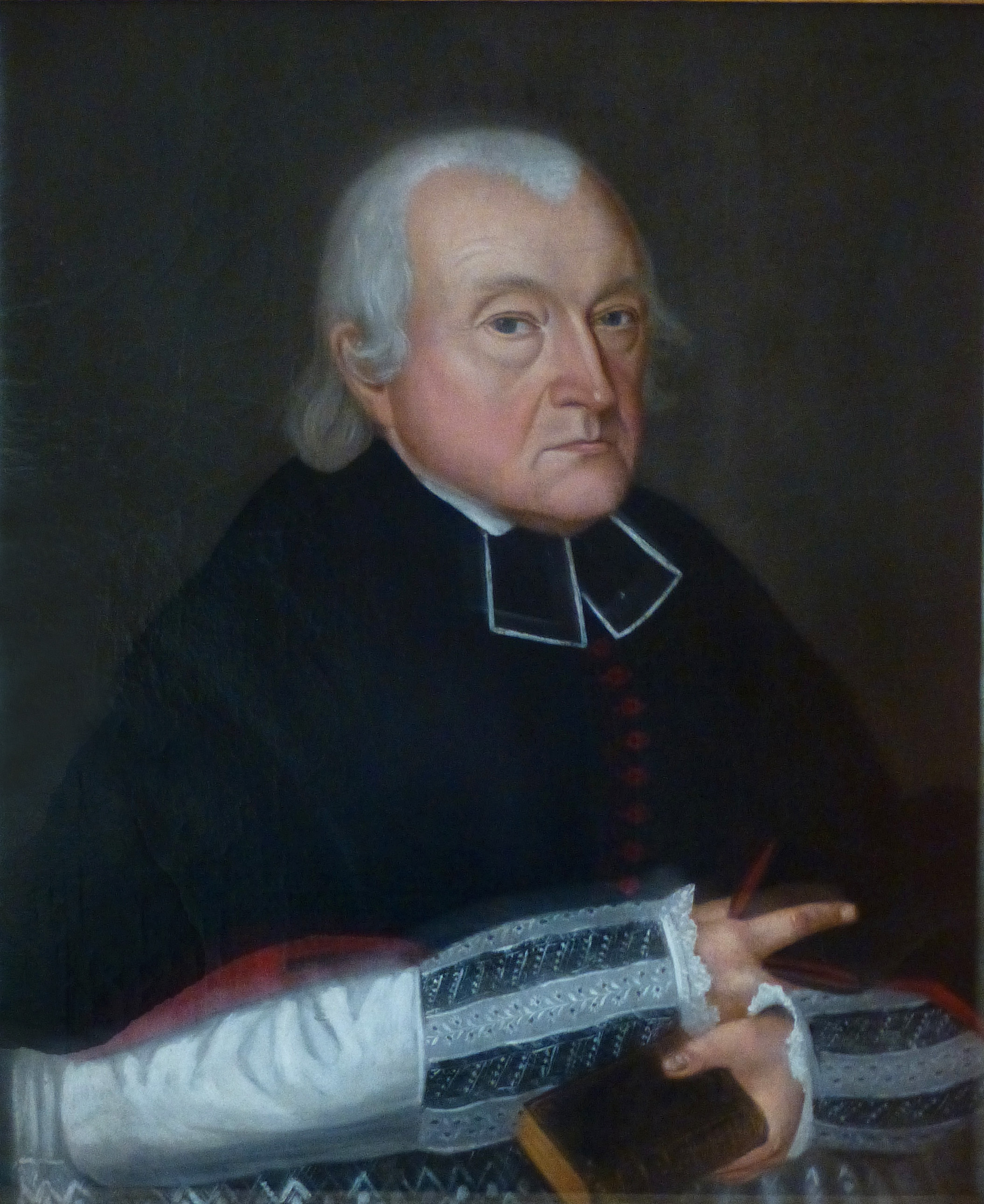 Portrait anonyme du chanoine Jean Baptiste Bouffleur, curé de la paroisse Saint-Nicolas de Haguenau de 1825 à 1833.